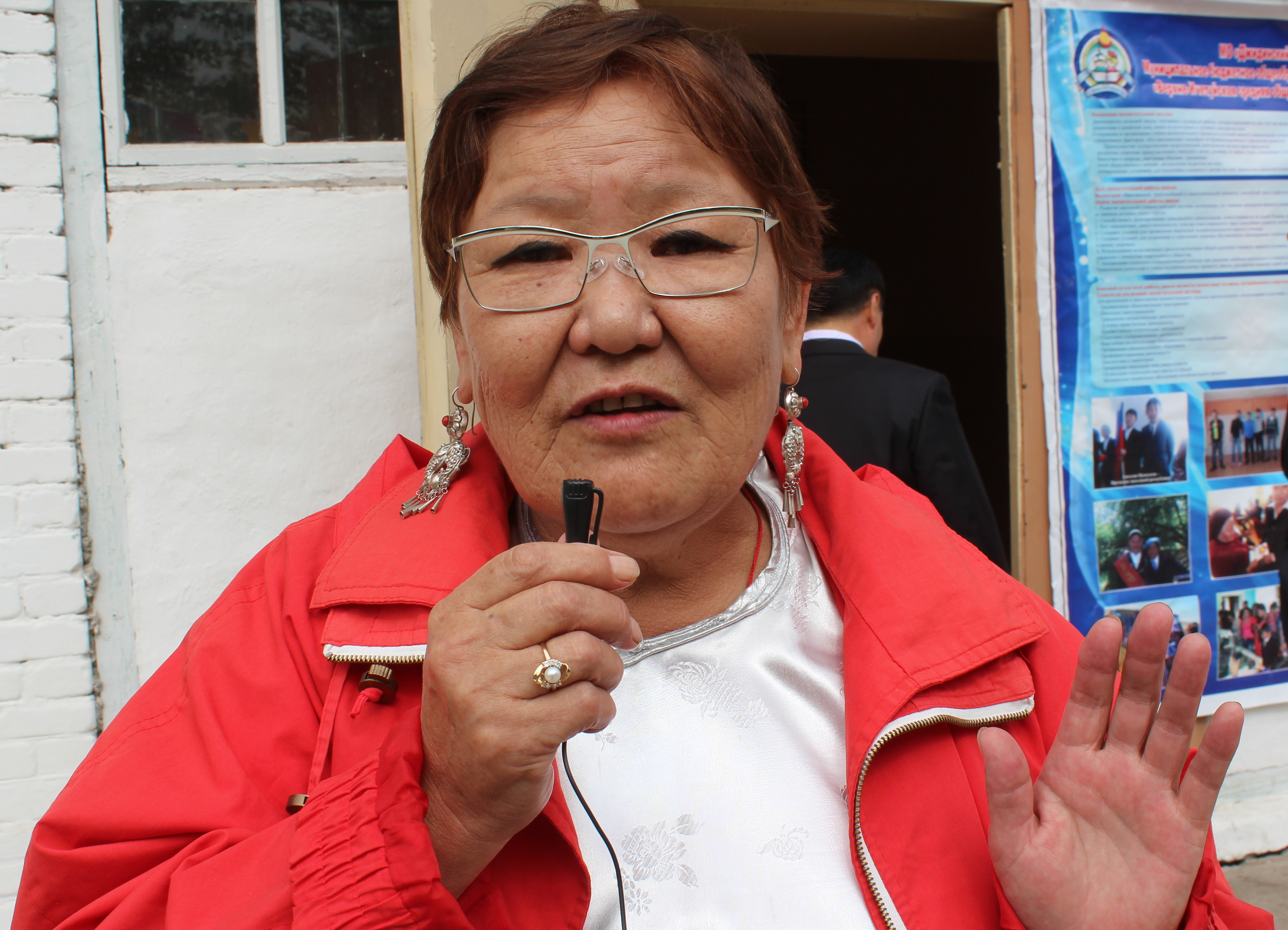 Галина Жигмытовна Раднаева - народный поэт Бурятии, собирательница джидинского фольклора. Село Верхний Ичётуй, Джидинский район, Бурятия. Презентация книги "Время, изменившее мир".